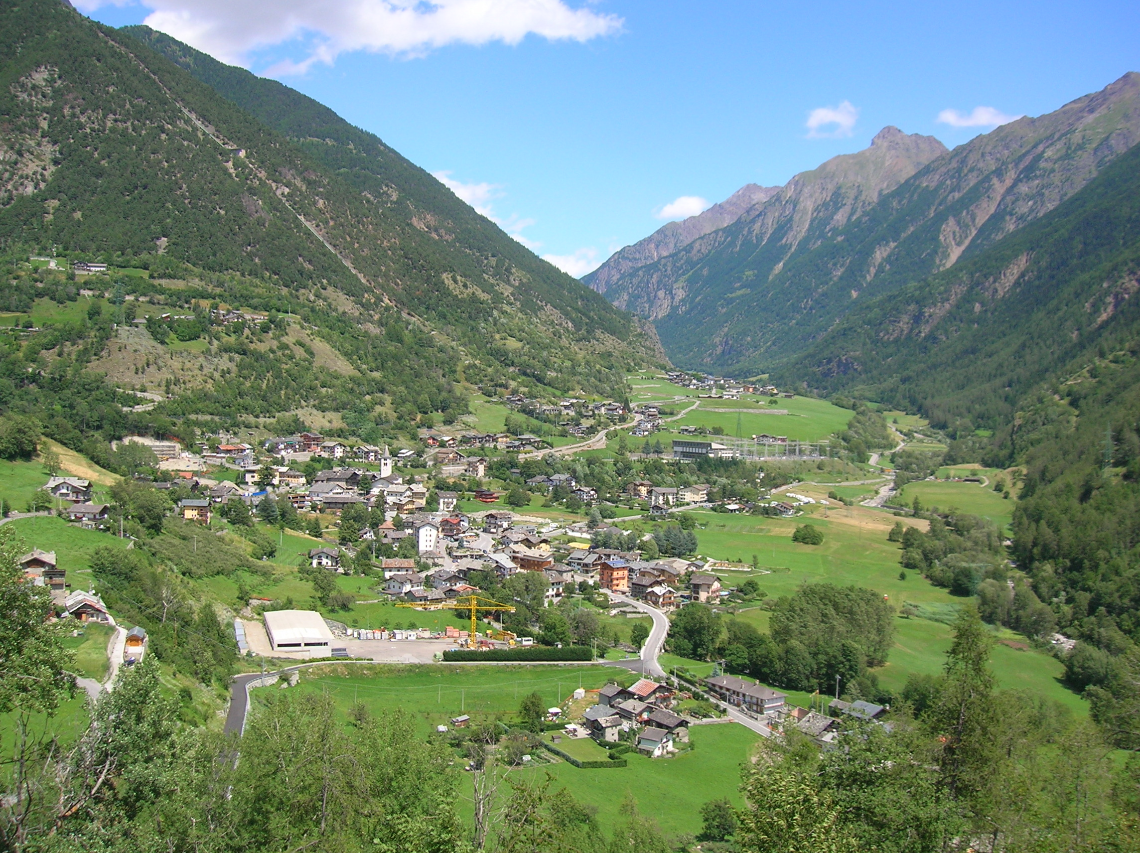 Valpelline, Valle d'Aosta, Italia.